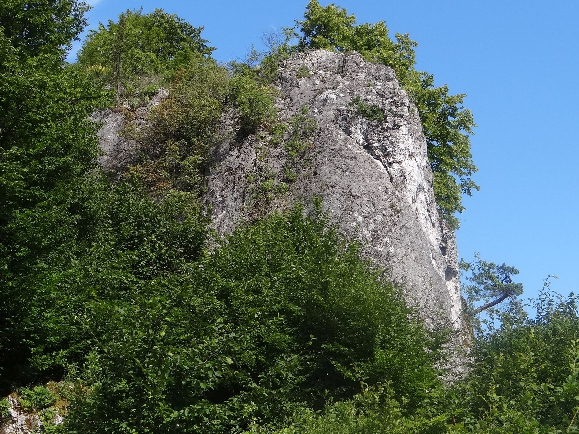 Skała Niwień we wsi Żelazko